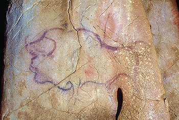 Arte parietal del Paleolítico superior. Cueva La Pasiega en el monte Castillo.